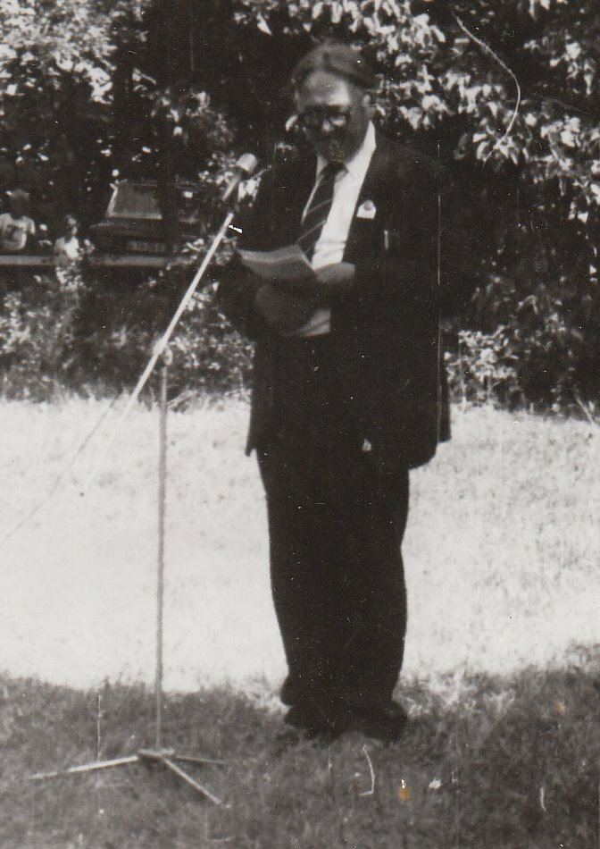 Meinhard Uustalu, ise pildistatud ja skanneeritud